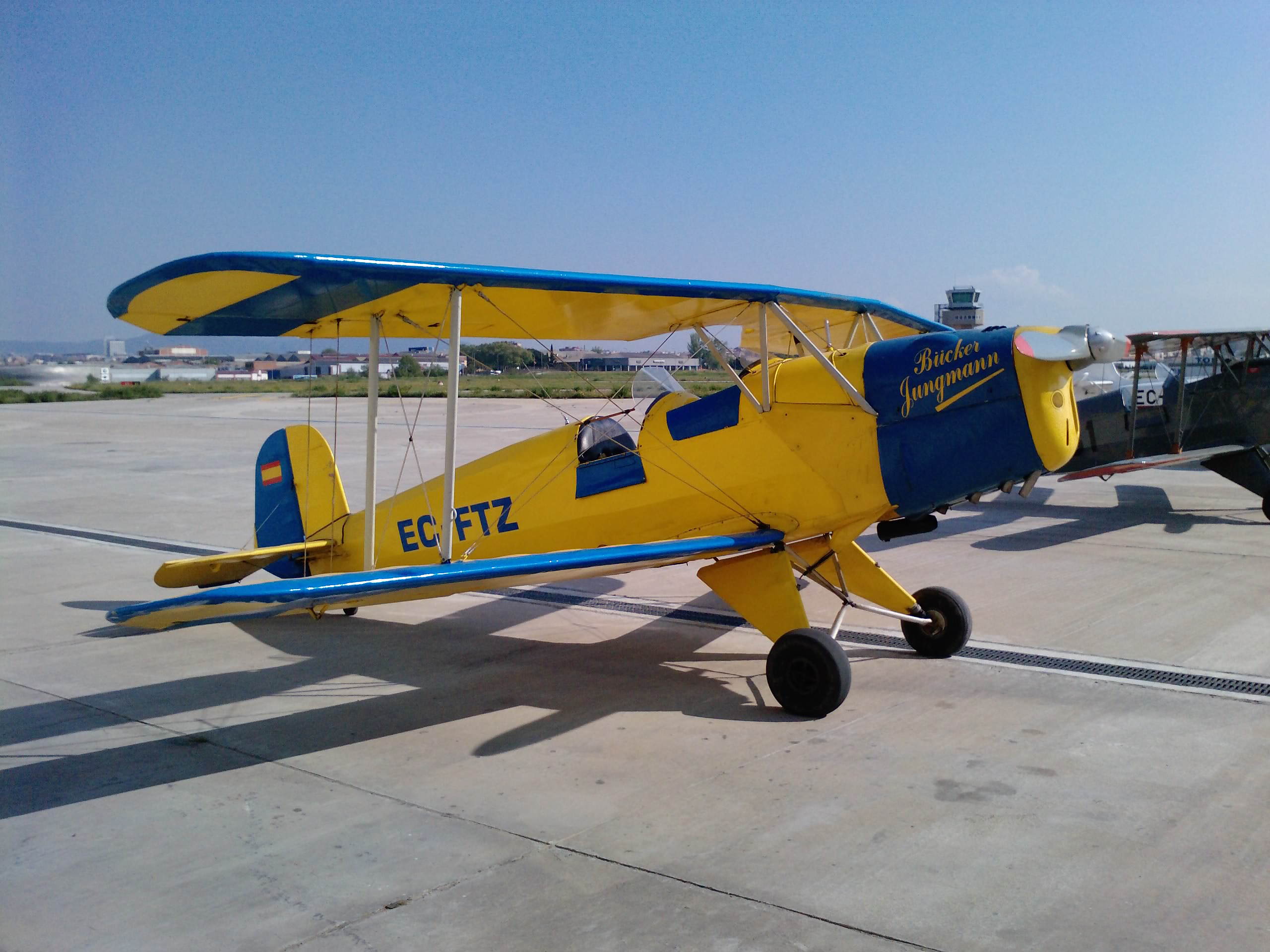 Avión propiedad de la FPAC